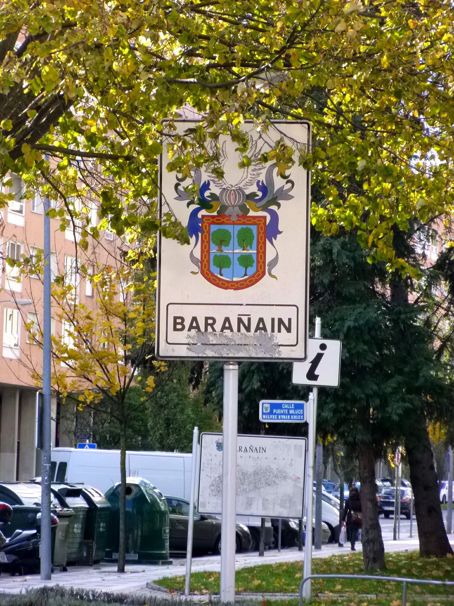 Paisaje urbano de Barañain (Navarra)